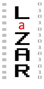 LaZAR-db